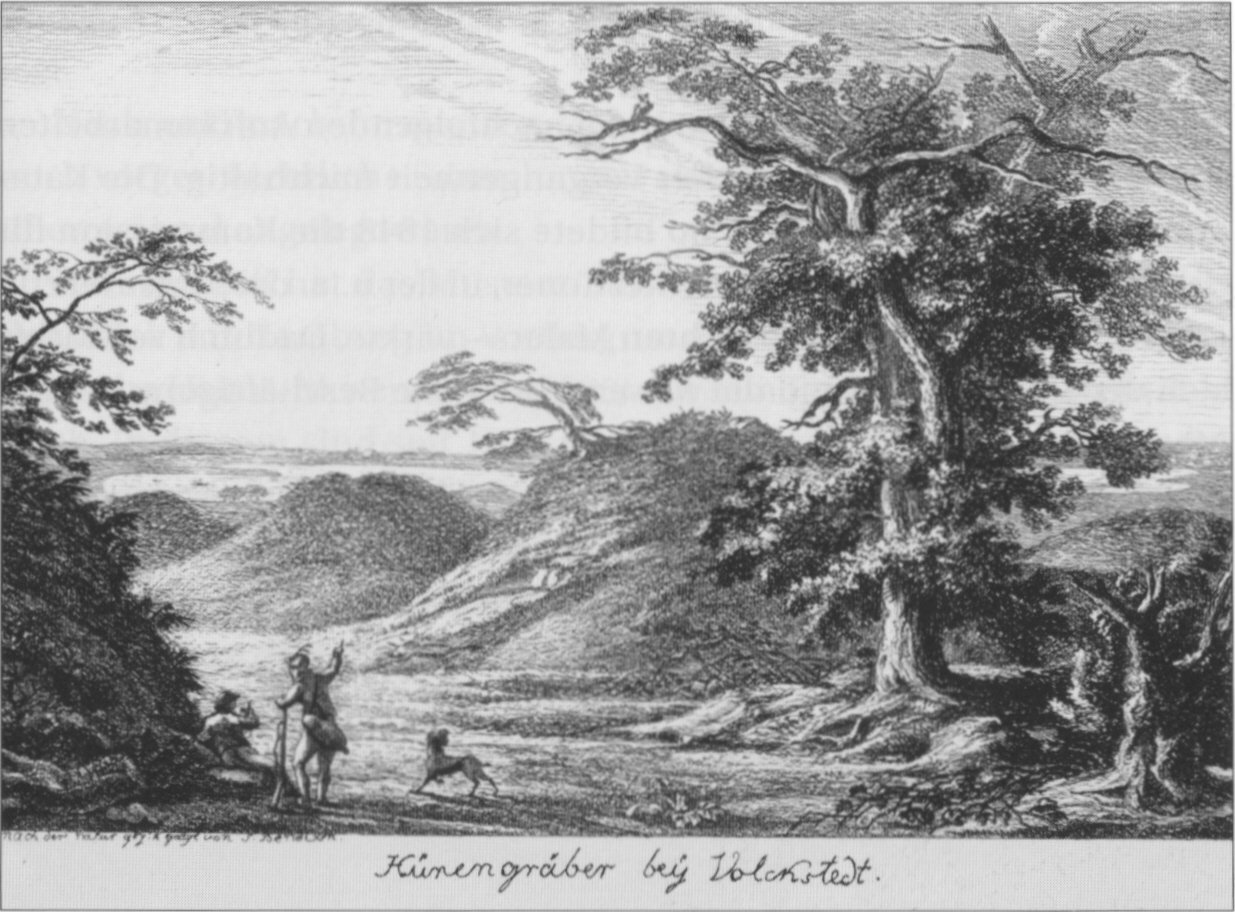 „Hünengräber bey Volckstedt“ (Hamburg-Volksdorf). Radierung von Siegfried Detlev Bendixen (1786-1864), vor 1832.